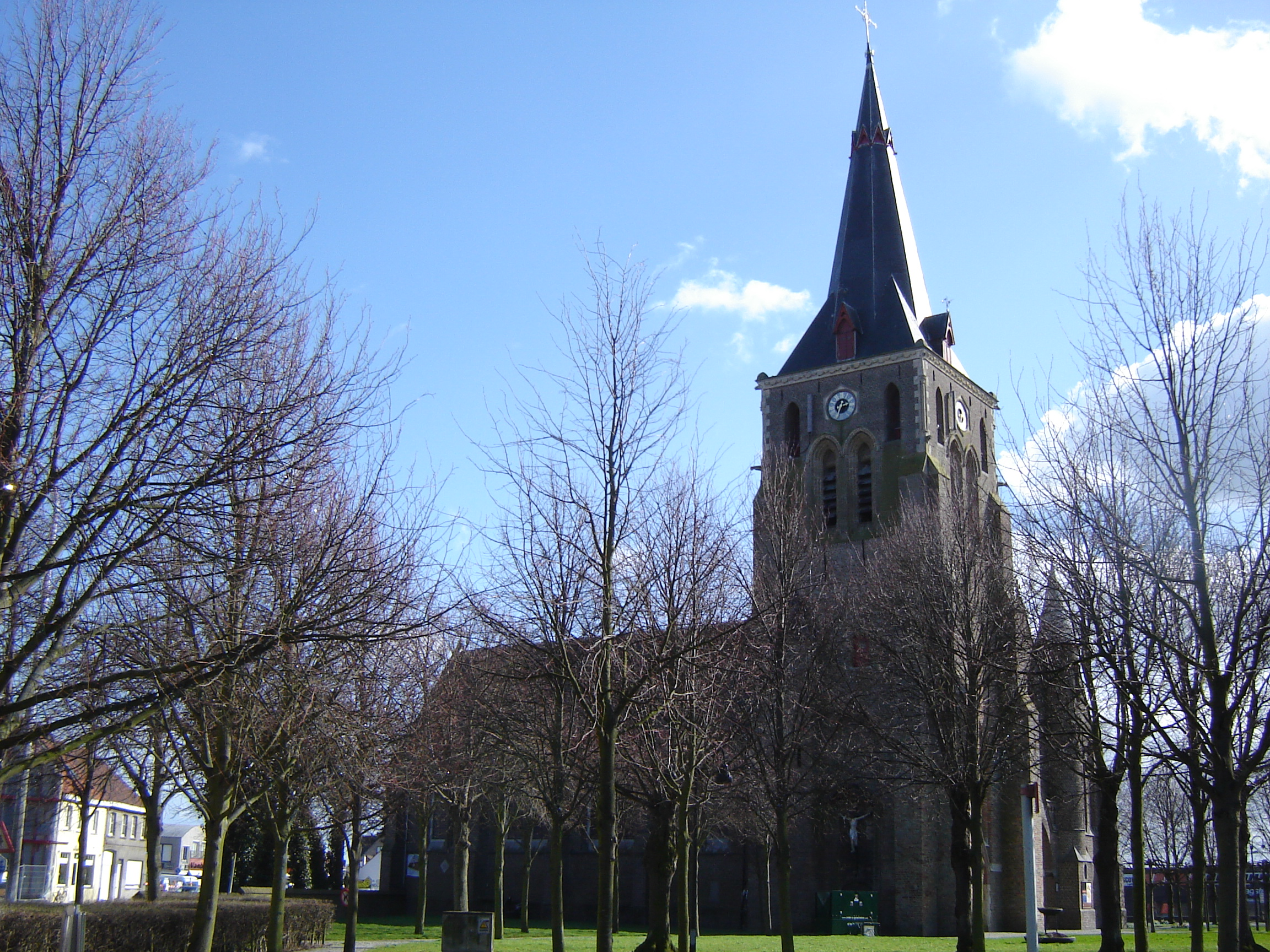 Sint-Amanduskerk in Uitkerke Church of Saint Amand in Uitkerke, Blankenberge, West Flanders, Belgium